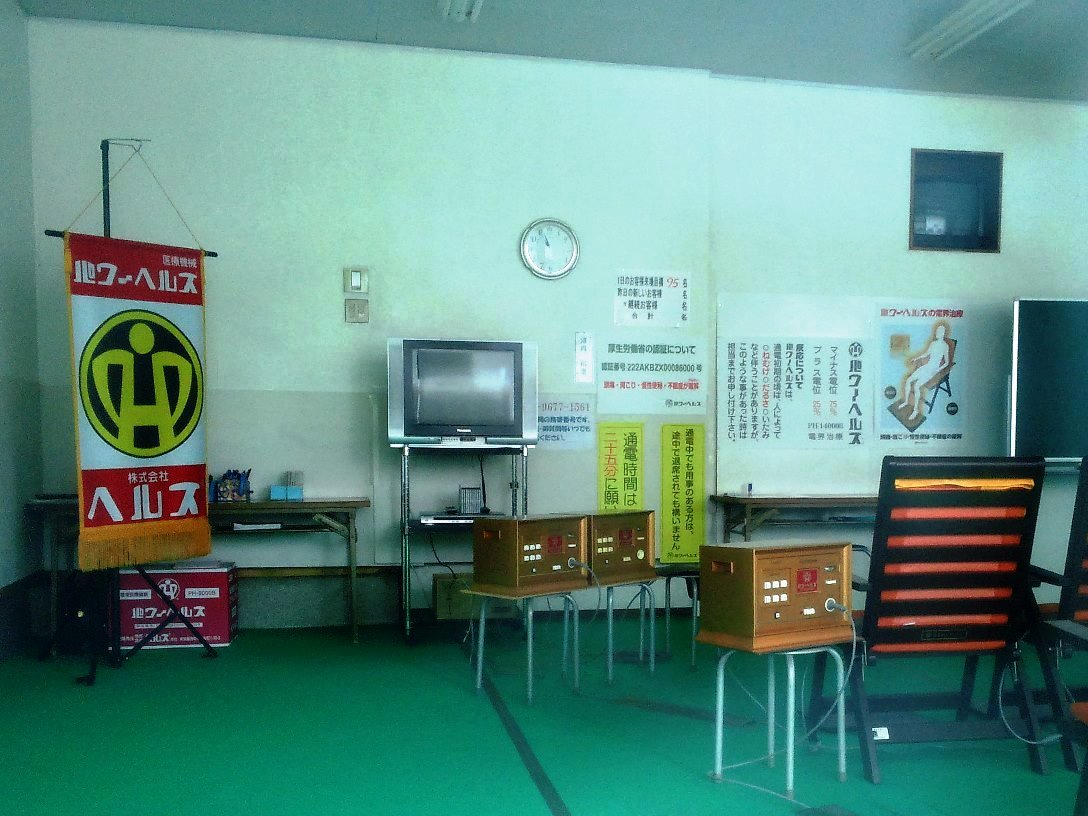 パワーヘルス体験会場内部002